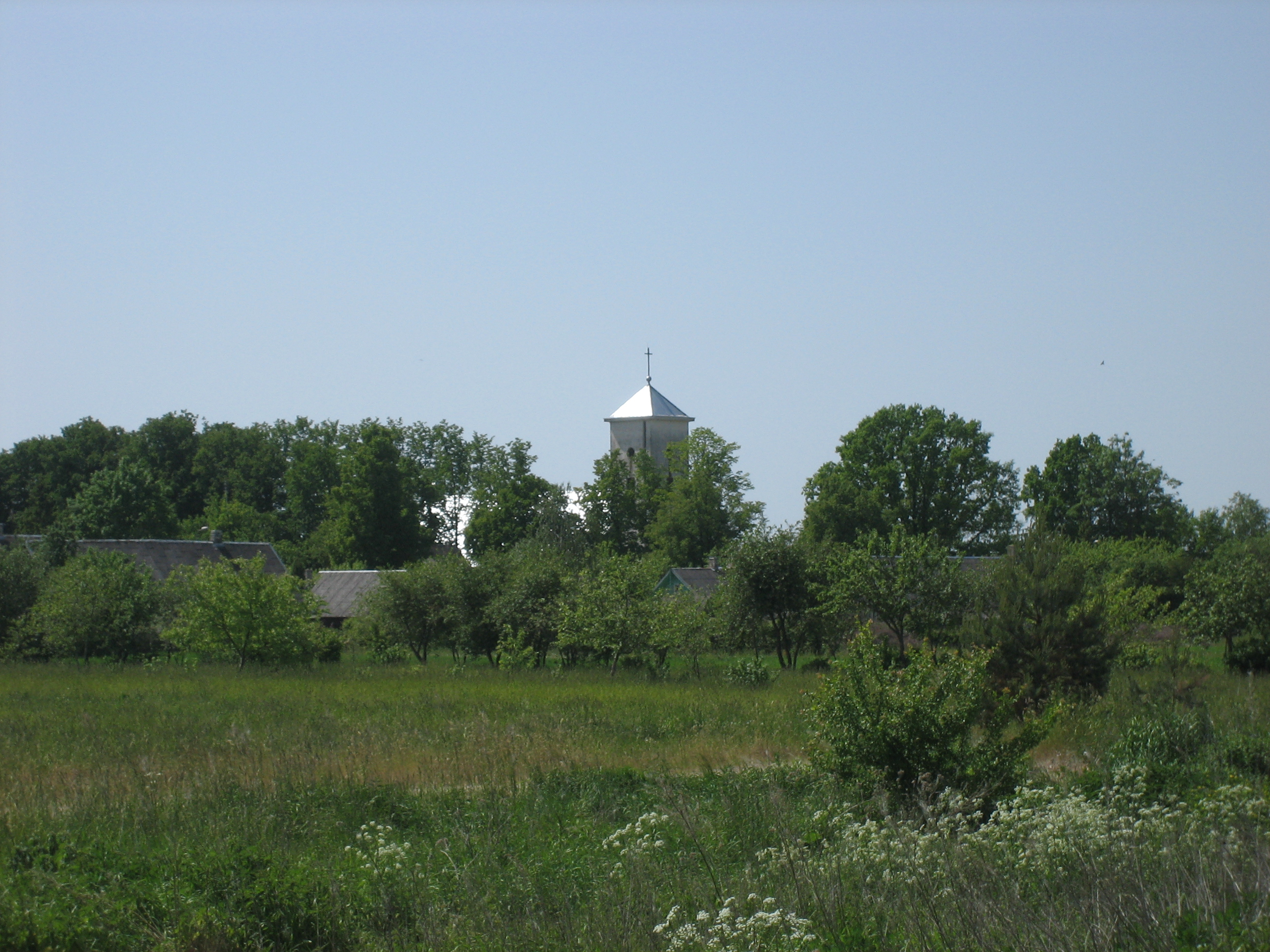 Lėnas